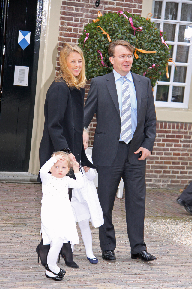 Prins Friso en zijn gezin bij paleis het Loo ter gelegenheid van de doop van Eliane van Vollenhoven dochter van Prins Floris en prinses Aimée.op zondag 28-3-2010.